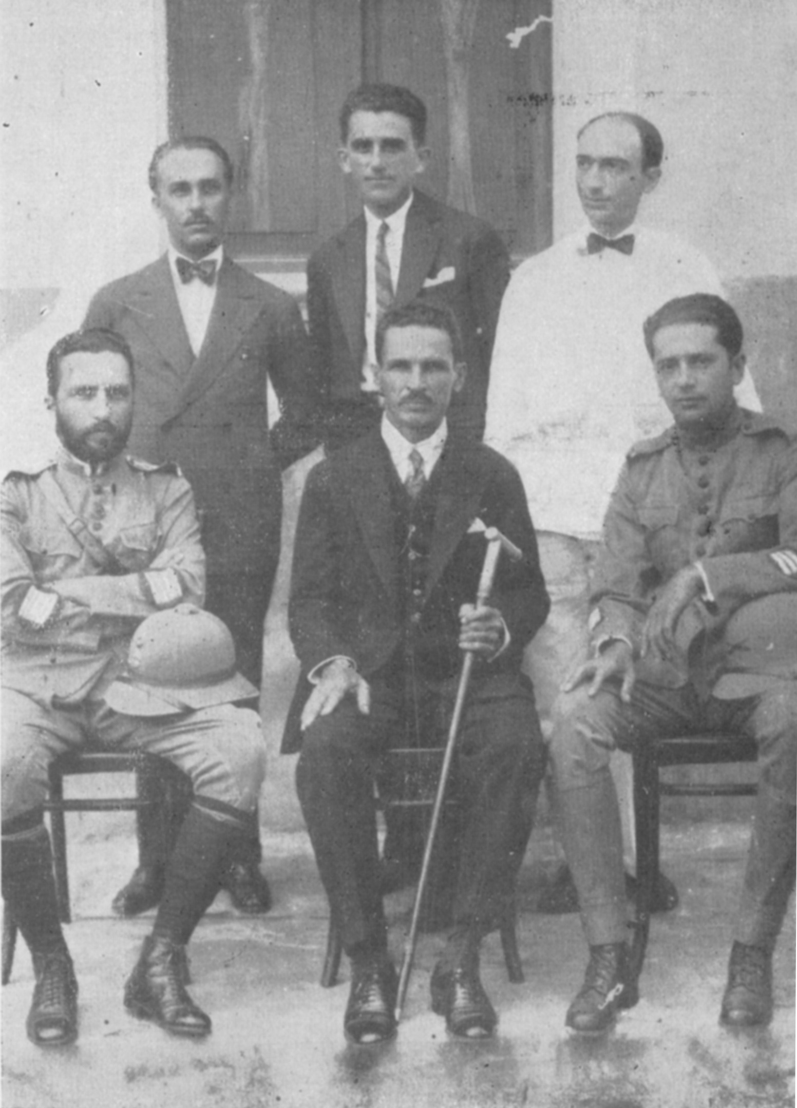 Comissão de desarmamento das Lavras Diamantinas. Ao centro o Coronel Horácio de Matos.